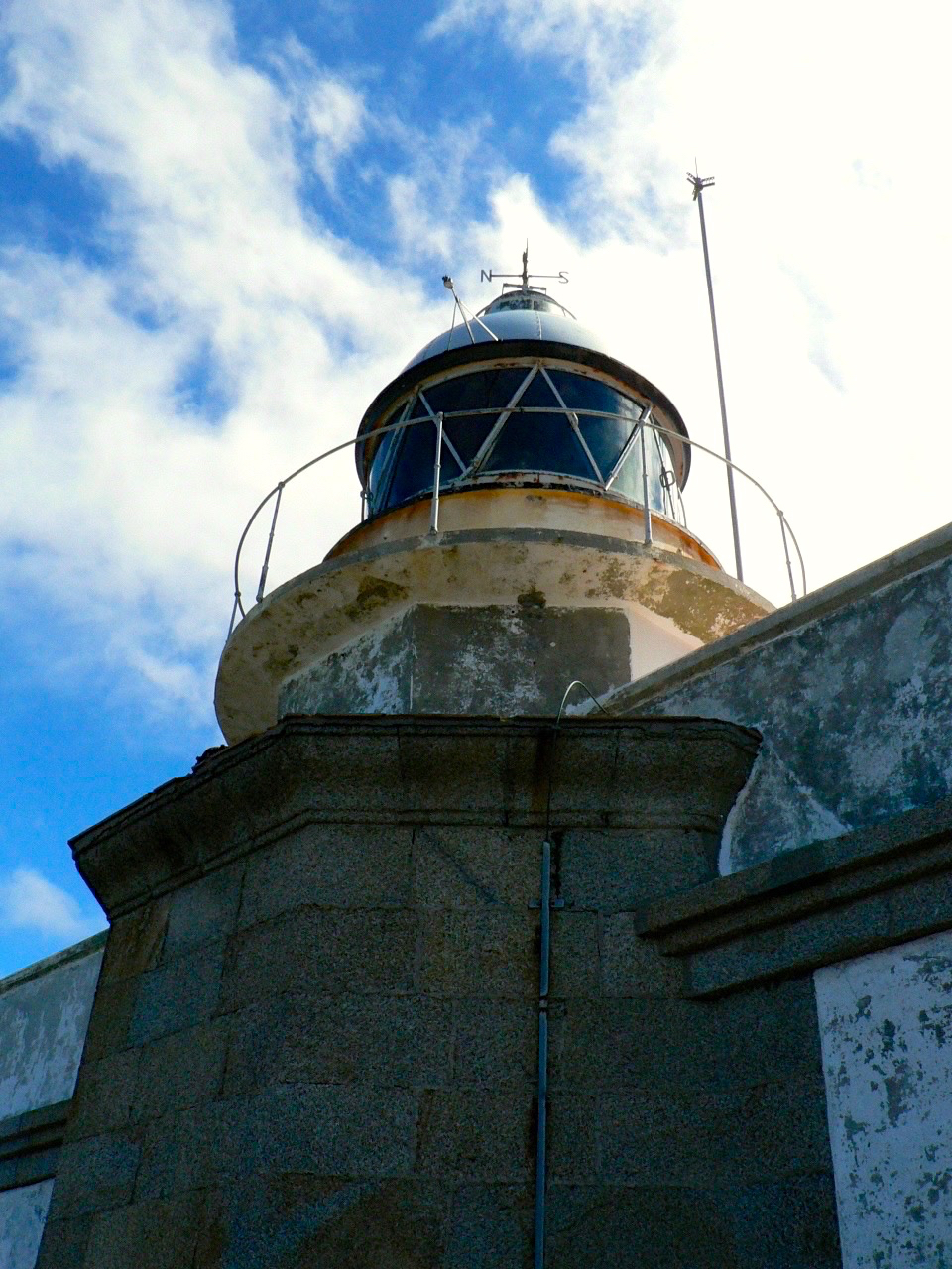 Ferrol - Faro de Cabo Prior en el año 2006, pintura de fachadas en mal estado.